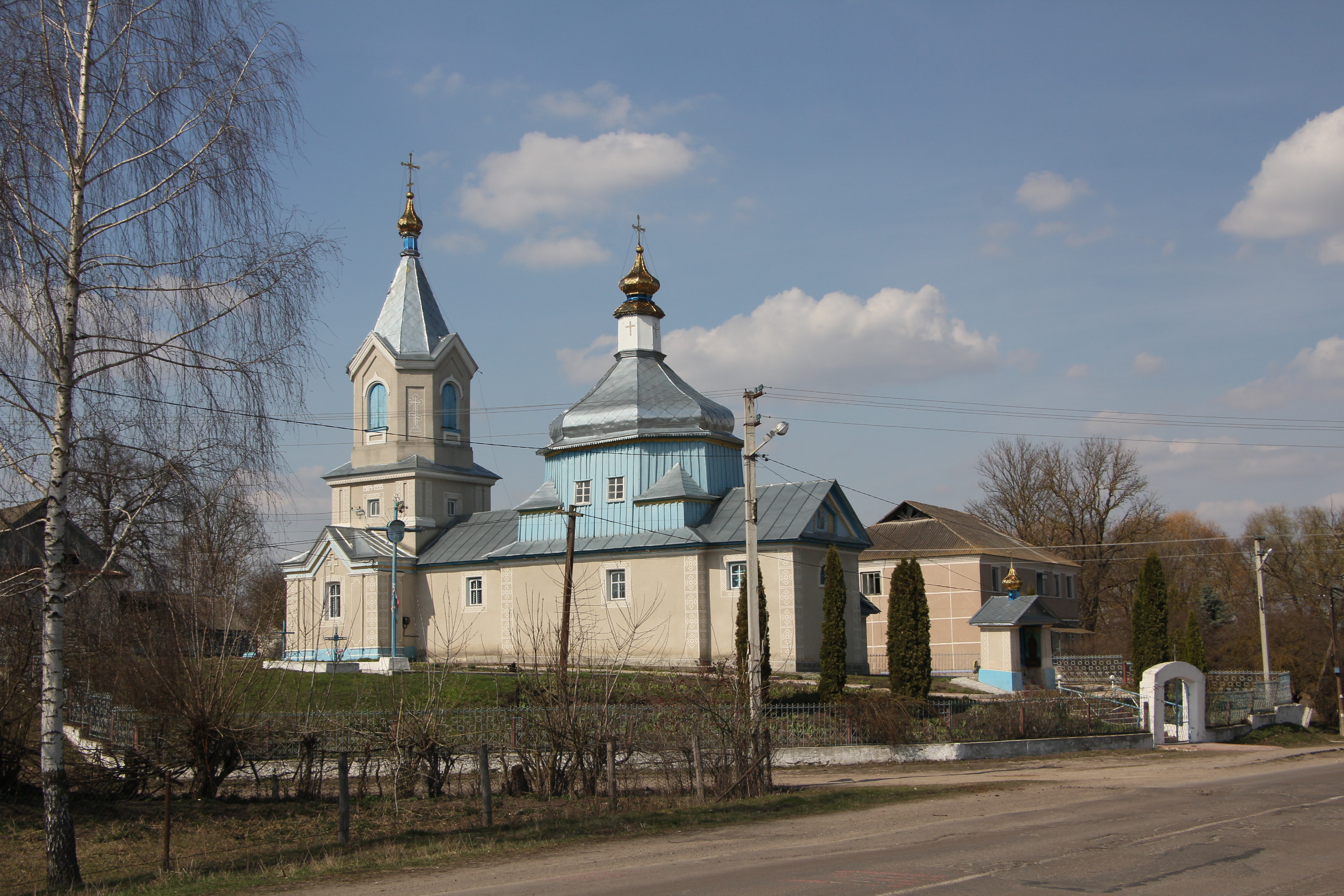 Стара кам'яна церква в селі Татаринці Лановецького району, Тернопільської області